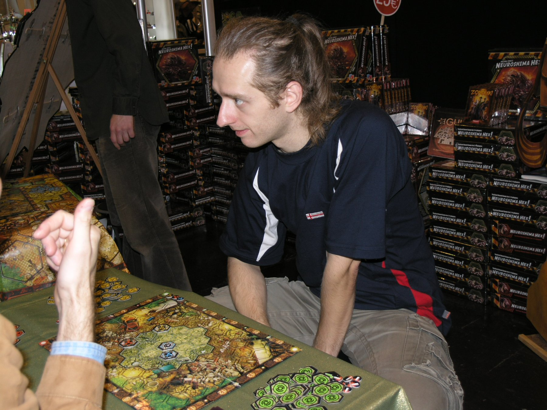 Michał Oracz autor hry Neuroshima Hex (Essen Spiel'07)